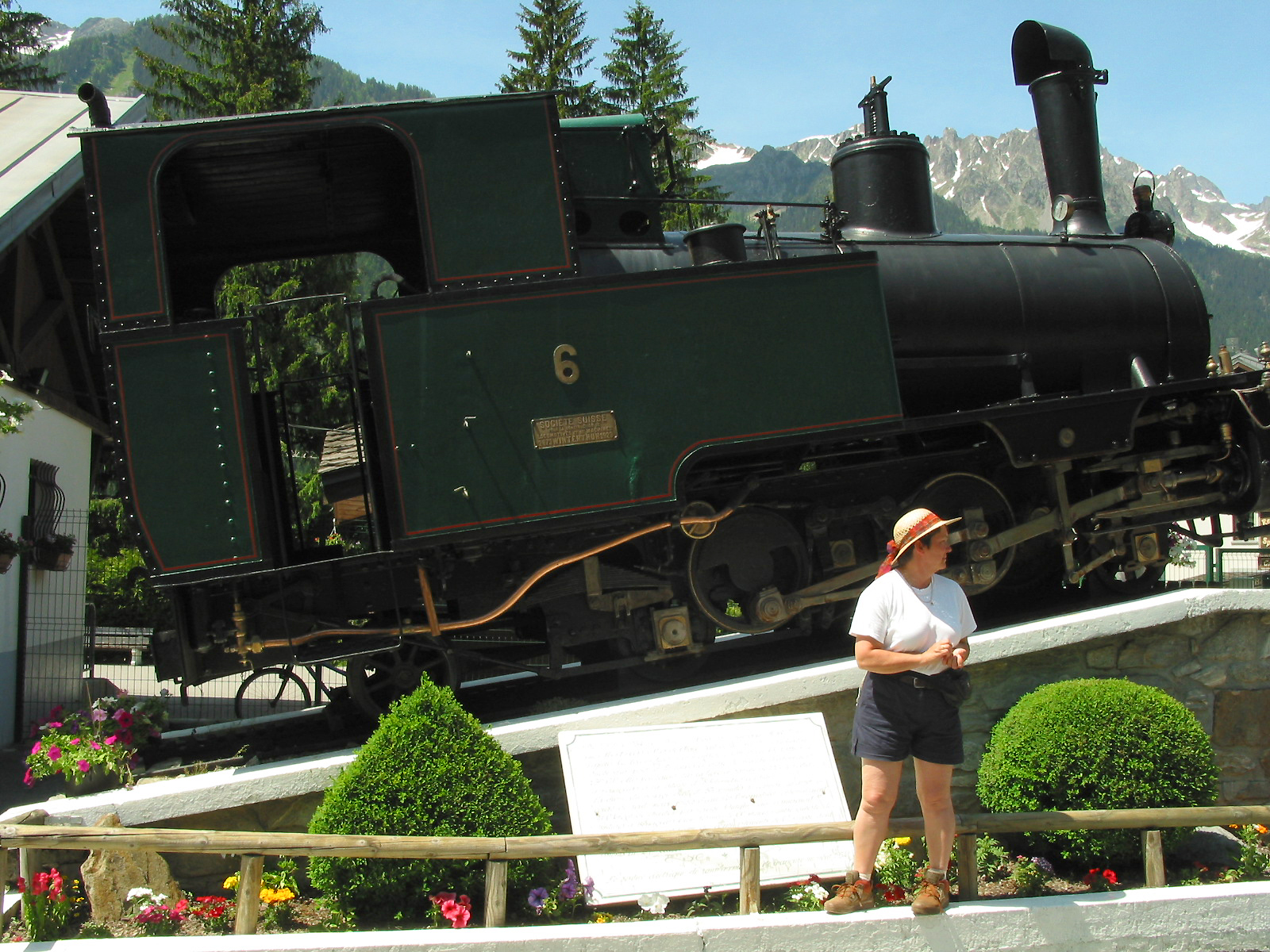 Chamonix-Mont-Blanc (Haute-Savoie - France), locomotive à crémaillère construite par la SLM Winterthur pour le chemin de fer de Montagne du « Montenvers».